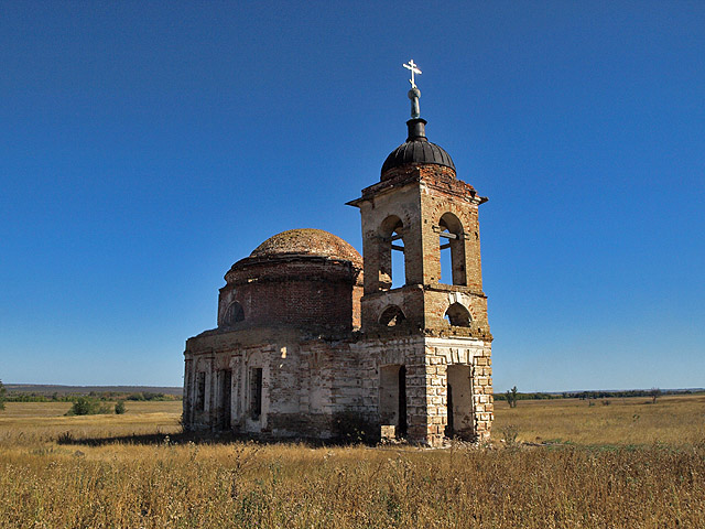 Спасо-Преображенская церковь в ныне не существующем Новоспасском, Саратовская область, Хвалынский район.